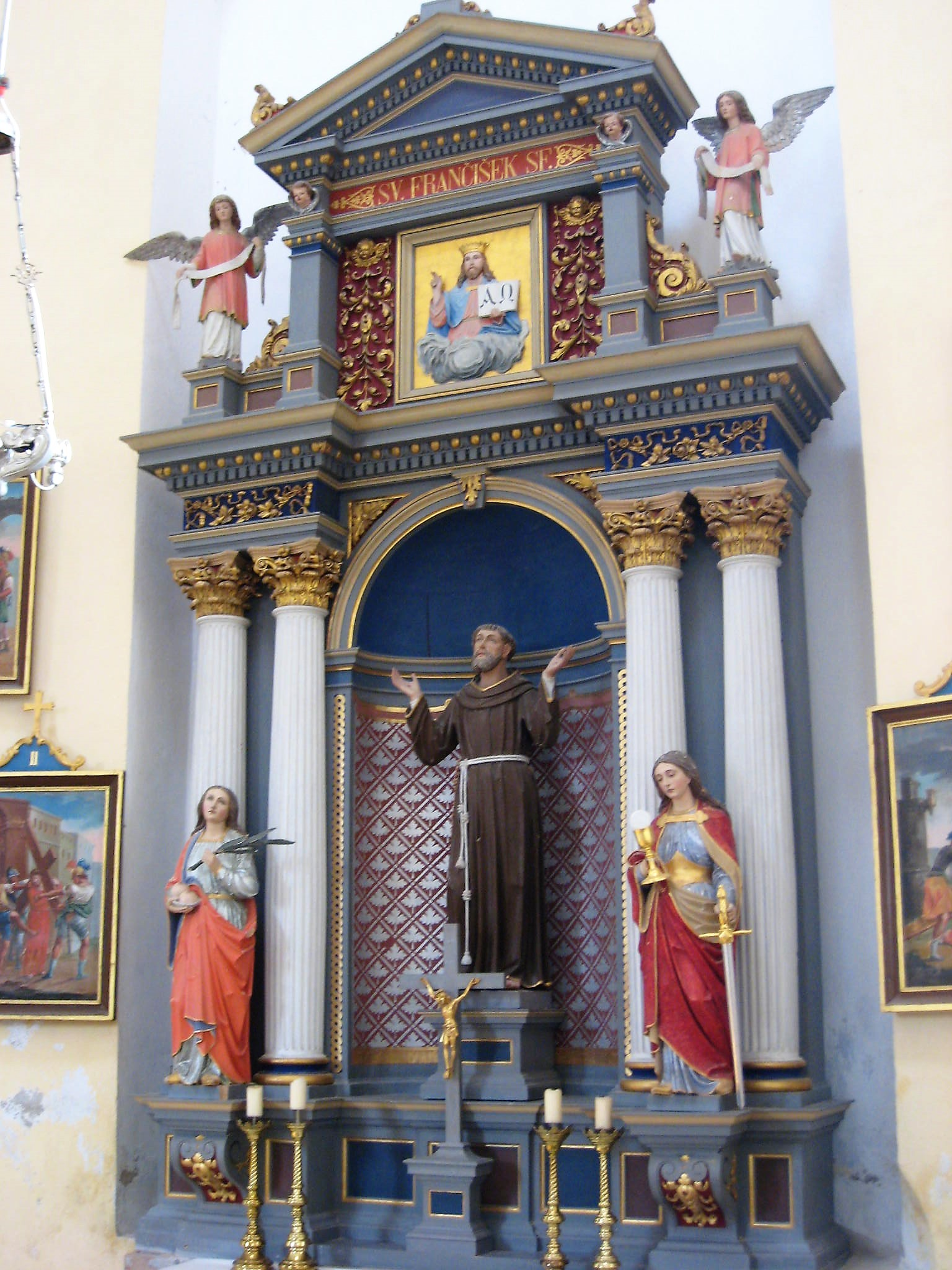 Cerkev sv. Andreja, Sveti Andrej: Stranski oltar sv. Frančiška s kipom sv. Frančiška v sredini ter s kipoma sv. Agate in sv. Barbare ob straneh, izdelal rezbar Andrej Rovšek iz Gaberja pod Limbarsko goro